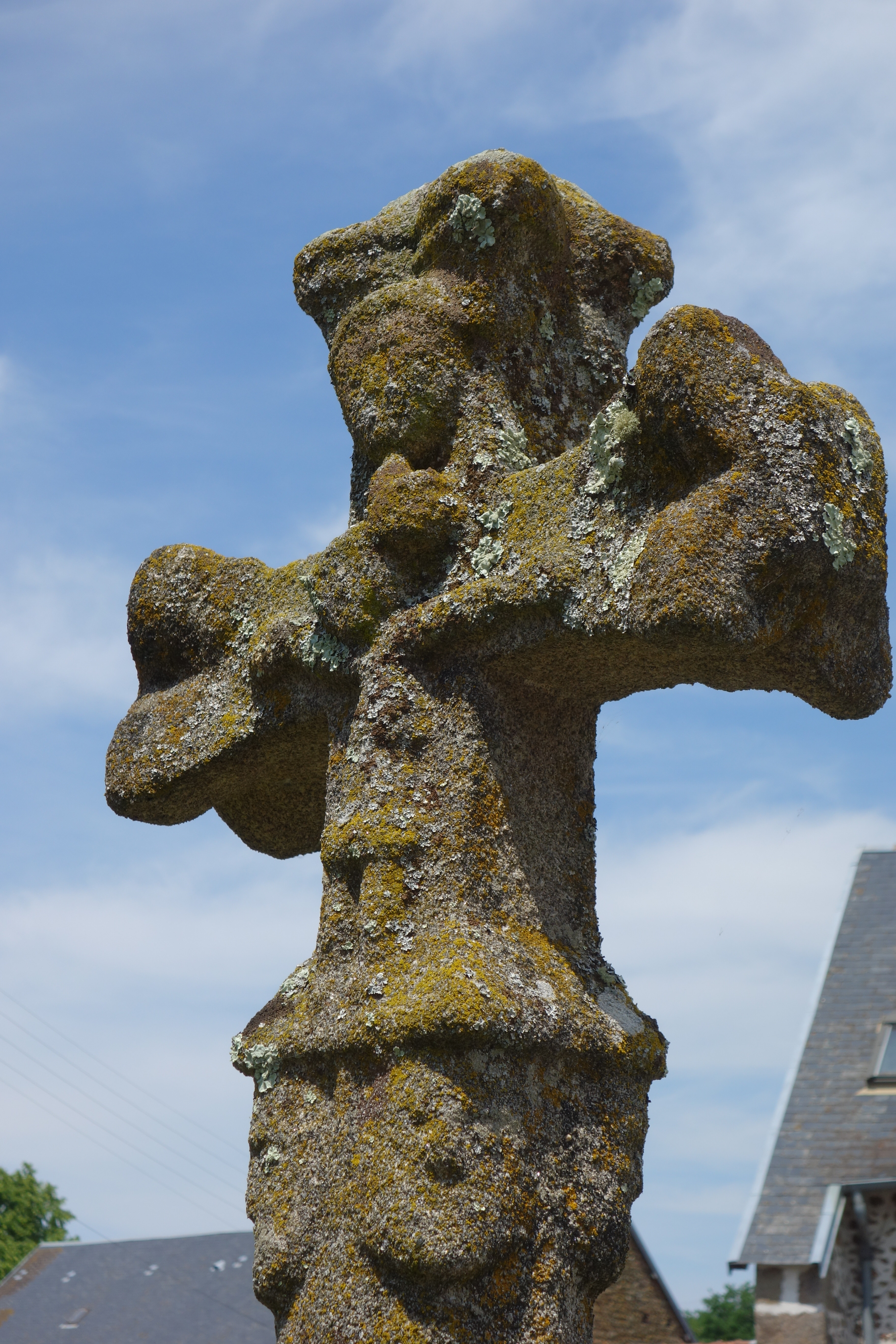 Croix de Châtenet